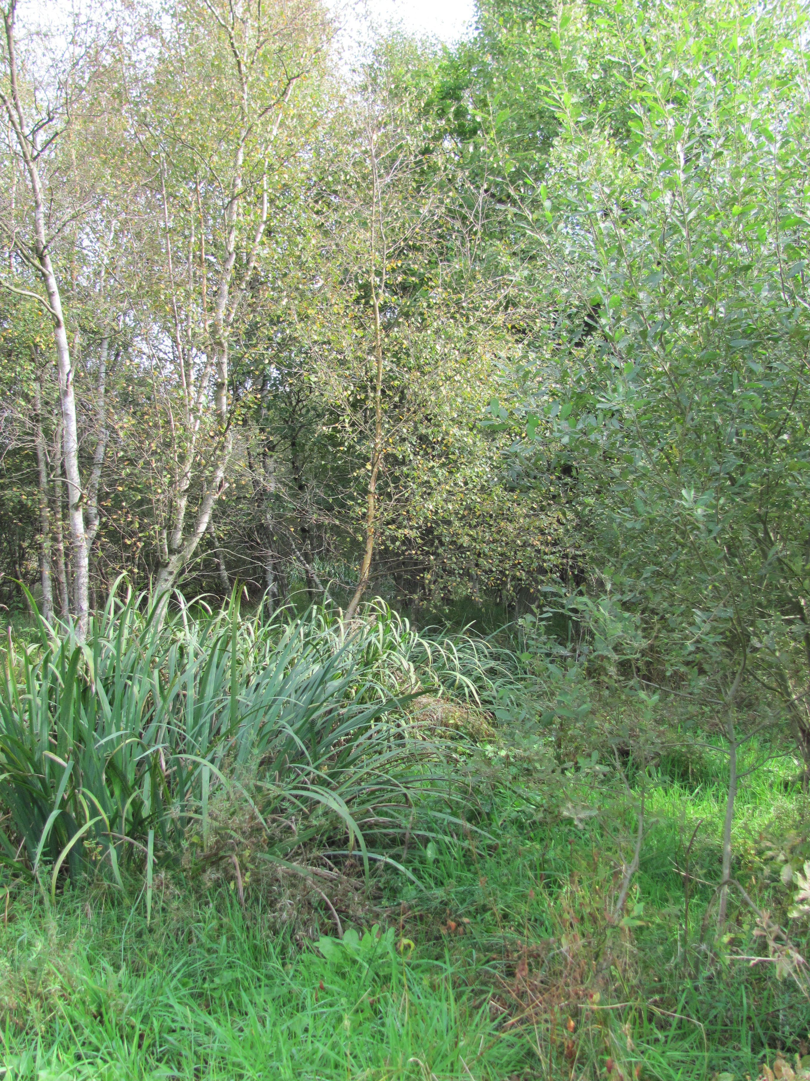 Naturdenkmal Poppenbüttler Graben in Hamburg-Poppenbüttel